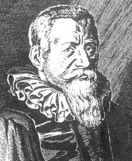 Ludolph van Ceulen, aus public domain